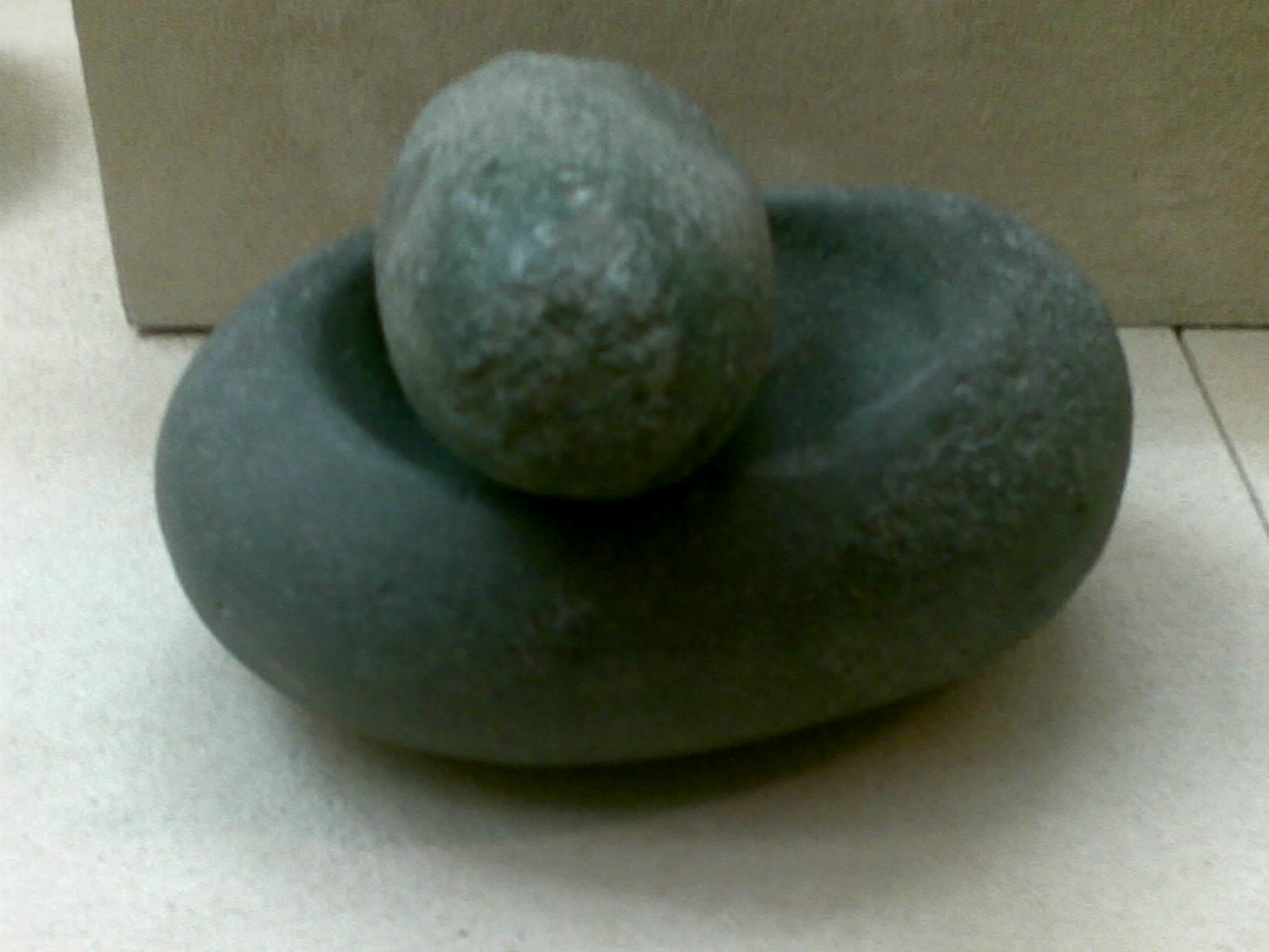 Qarğalar təpəsi yaşayış yerindən taplmış (Eneolit dövrü) dən daşı